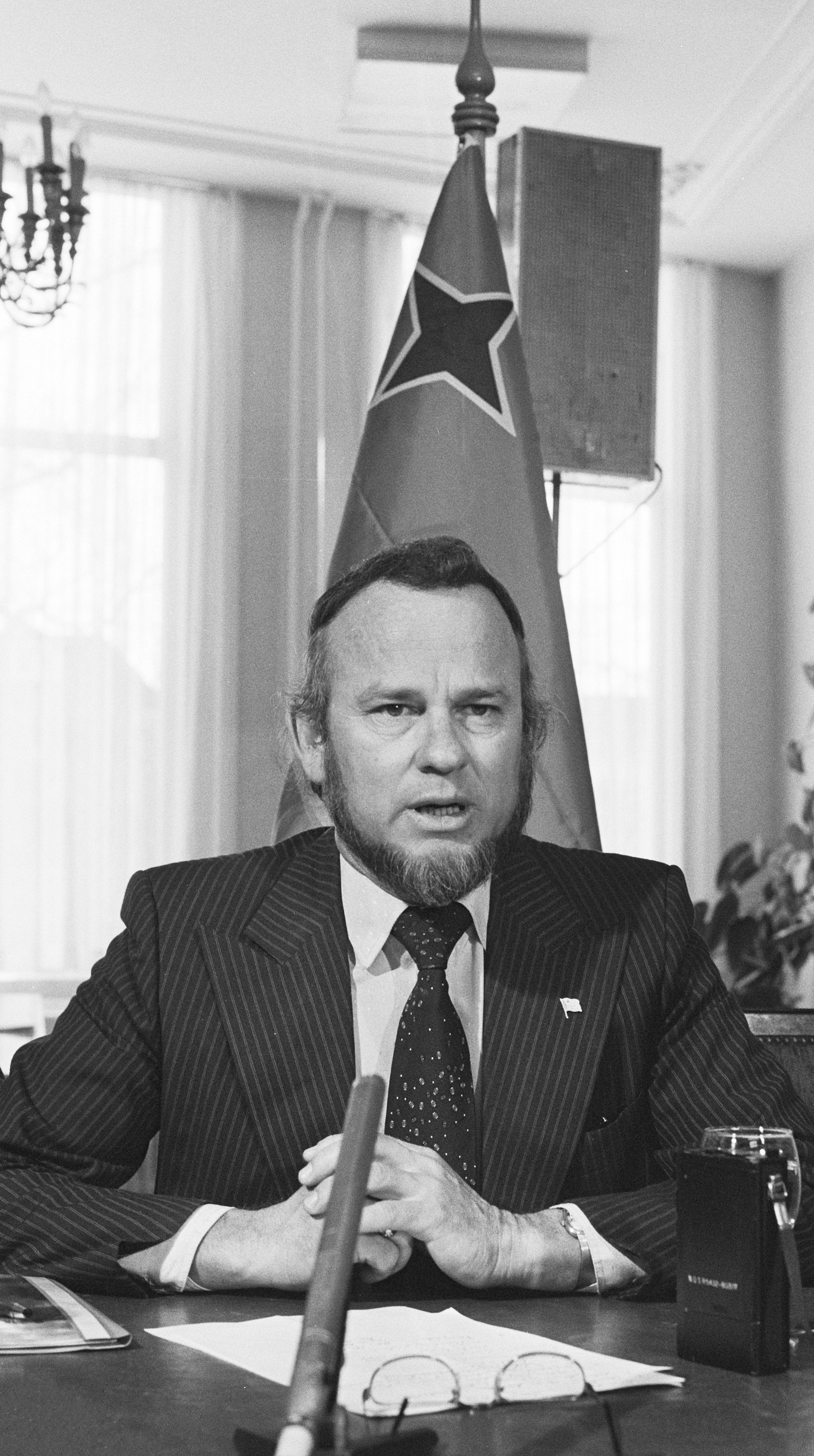 Opening "Aruba Huis" in Den Haag . Betico Croes tijdens persconferentie, 20a mr. J. H. van der Kuyp , vert. Aruba en Betico Croes